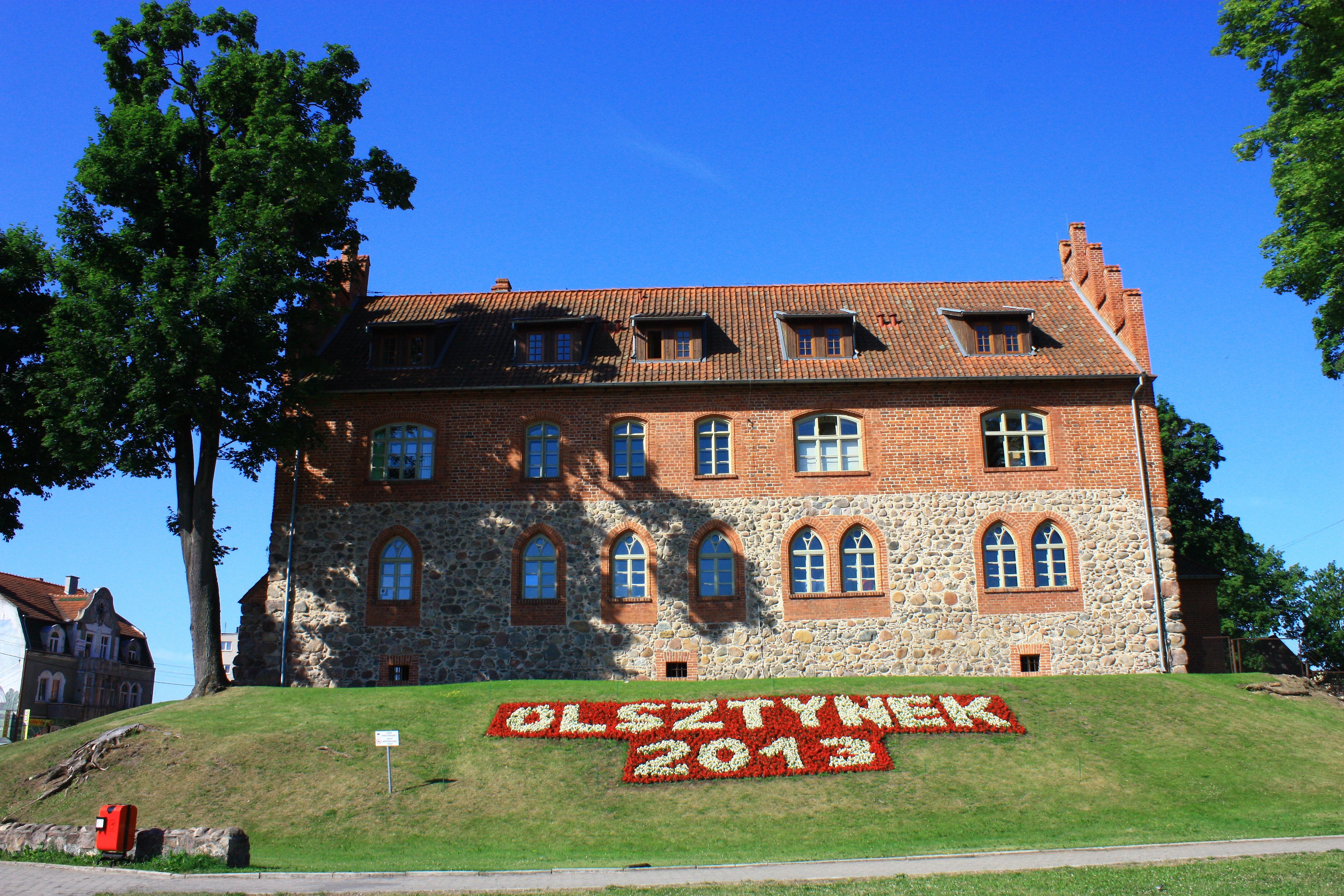 Olsztynek, zamek, ob. szkoła, 1 poł. XIV, XVII, XIX